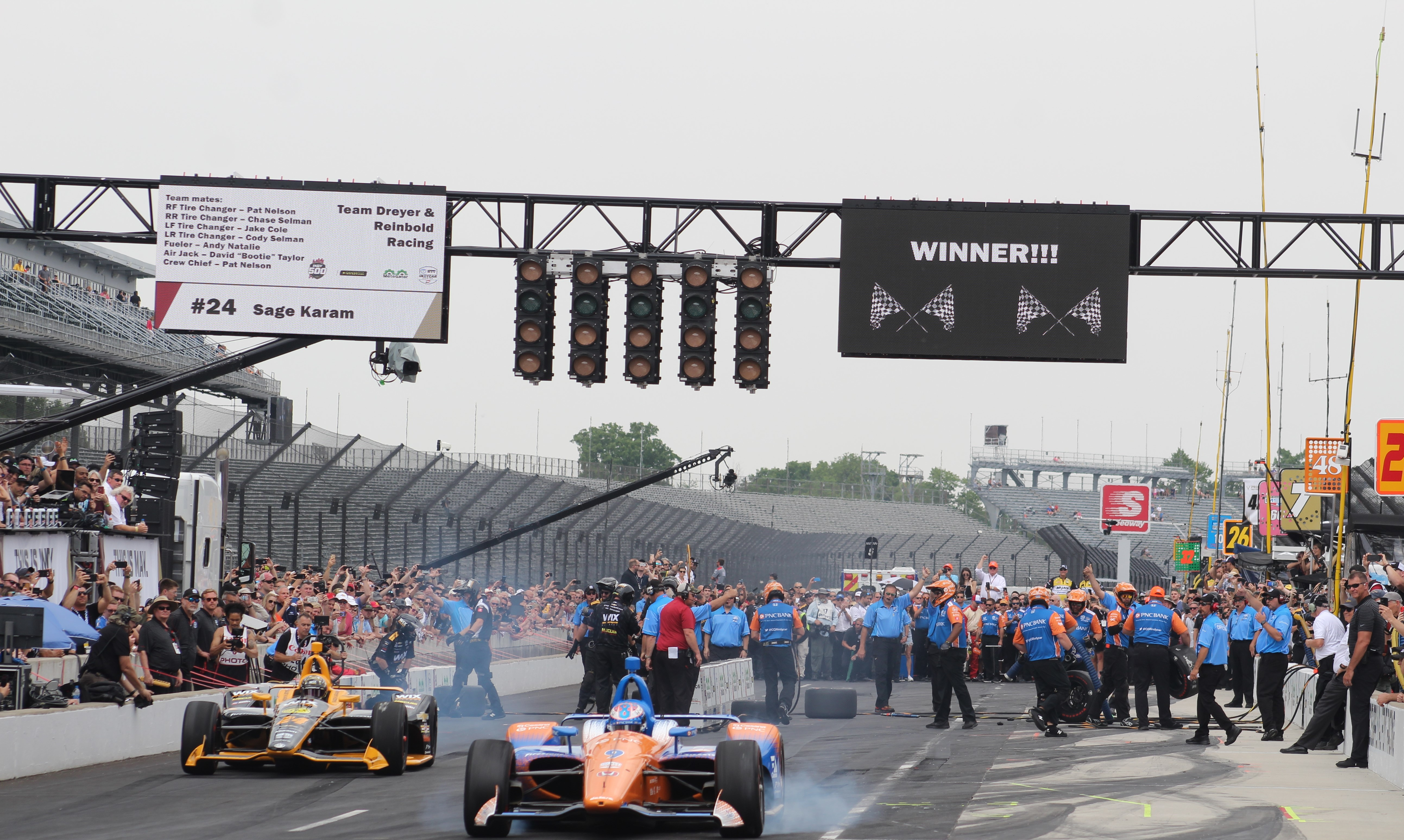 2019 Indianapolis 500